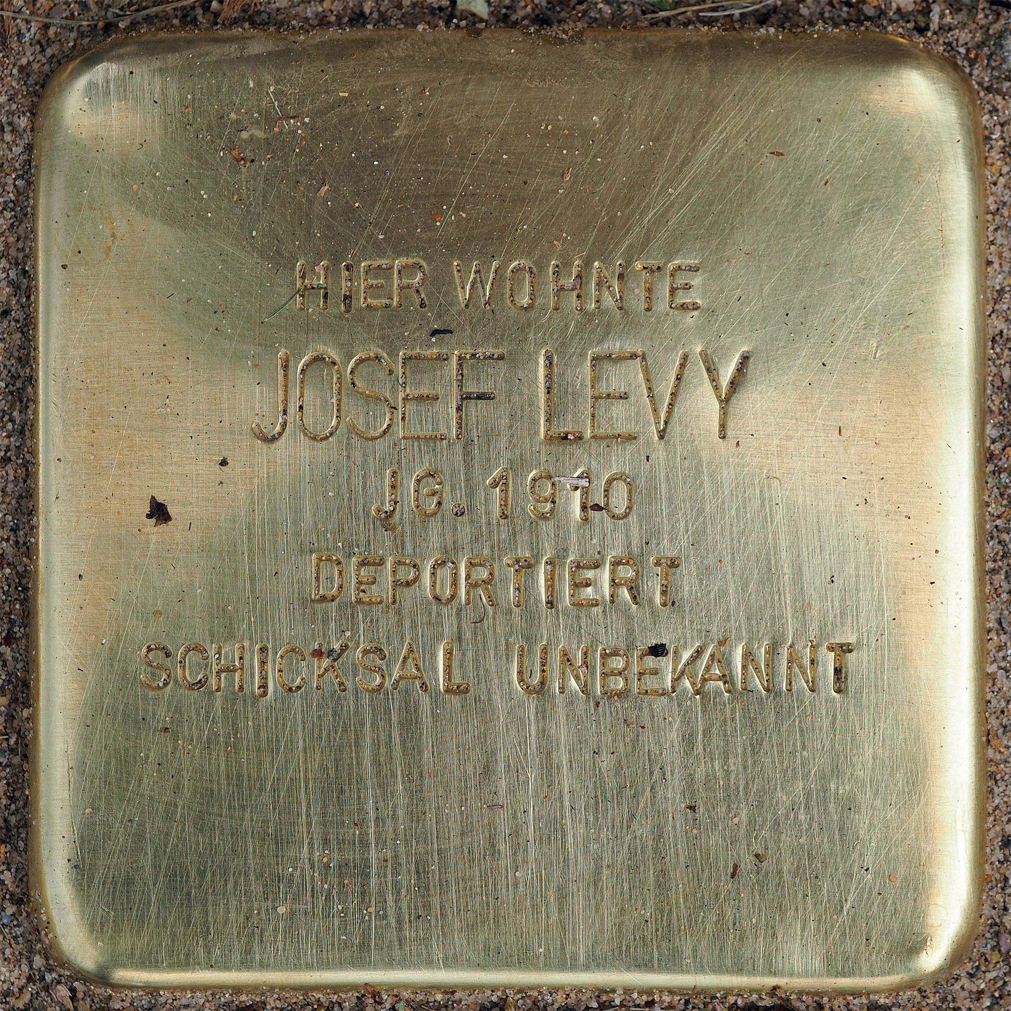 Stolpersteine Suechteln: Levy, Josef